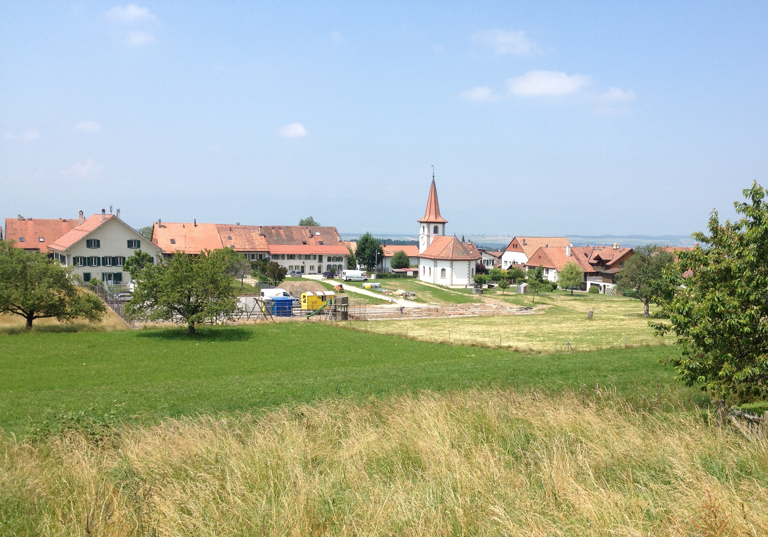 Villars-Tiercelin dans la commune suisse de Jorat-Me